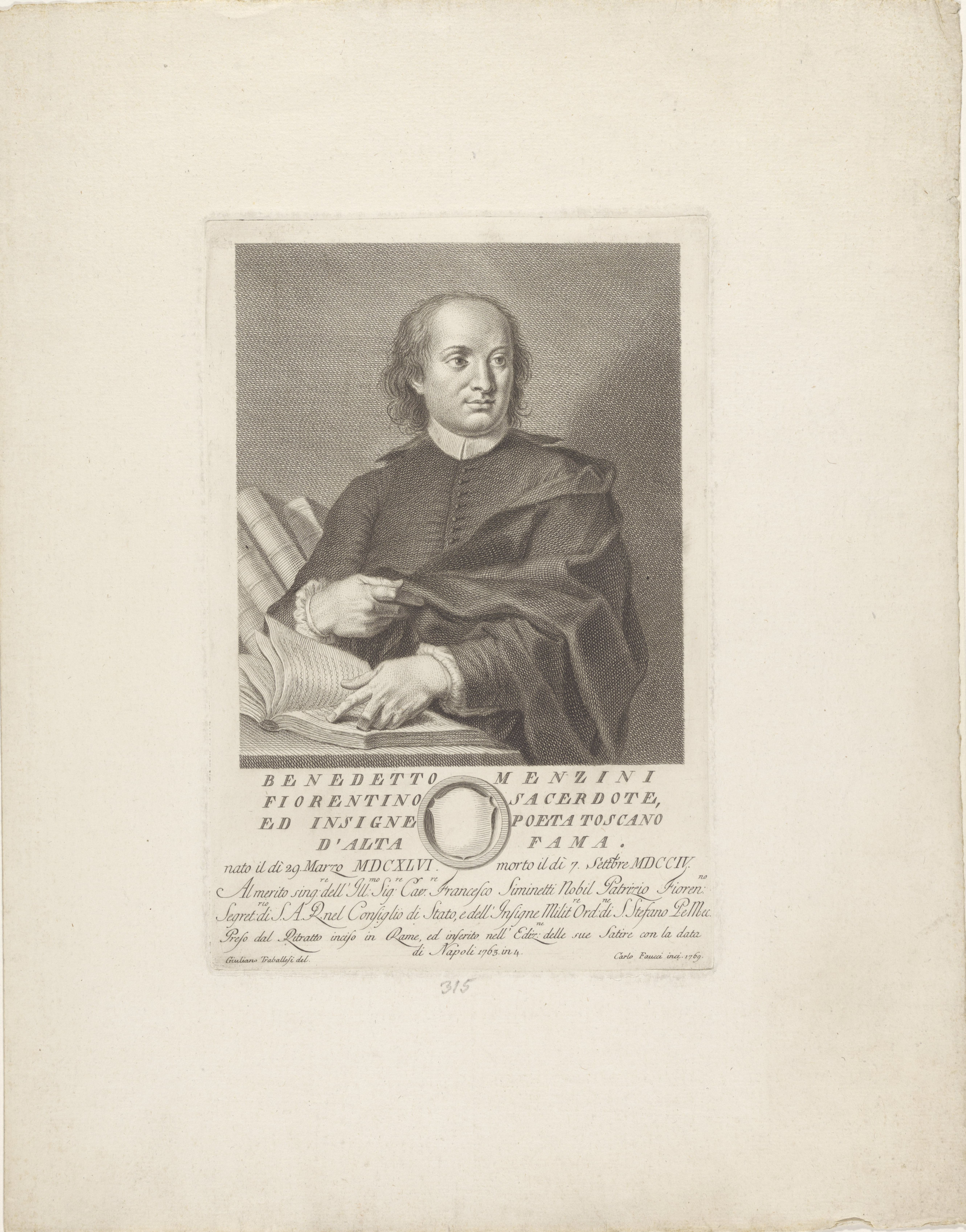 IdentificatieTitel(s): Portret van priester en dichter Benedetto MenziniPortretten van beroemde Italianen met wapenschild in ondermarge (serietitel)Objecttype: prent Objectnummer: RP-P-1909-4910Catalogusreferentie: LeBlanc 51Opschriften / Merken: verzamelaarsmerk, verso, gestempeld: Lugt 1388verzamelaarsmerk, verso, gestempeld: Lugt 2228VervaardigingVervaardiger: prentmaker: Carlo Faucci (vermeld op object)naar tekening van: Giuliano Traballesi (vermeld op object)opgedragen aan: Francesco Siminetti (vermeld op object)Plaats vervaardiging: prentmaker: Italiënaar tekening van: Italiëopgedragen aan: FlorenceDatering: 1763 - 1784Fysieke kenmerken: etsMateriaal: papier Techniek: etsenAfmetingen: plaatrand: h 298 mm × b 200 mmToelichtingDeze prent maakt deel uit van een reeks portretprenten van onbekende omvang. De prenten zijn gemaakt door meedere prentmakers, onder Wie: Francesco Allegrini en Carlo en Raimondo Faucci.OnderwerpWat: portrait of a writerwriter, poet, authorhistorical personsWieBenedetto MenziniVerwerving en rechtenVerwerving: aankoop 1905Copyright: Publiek domein